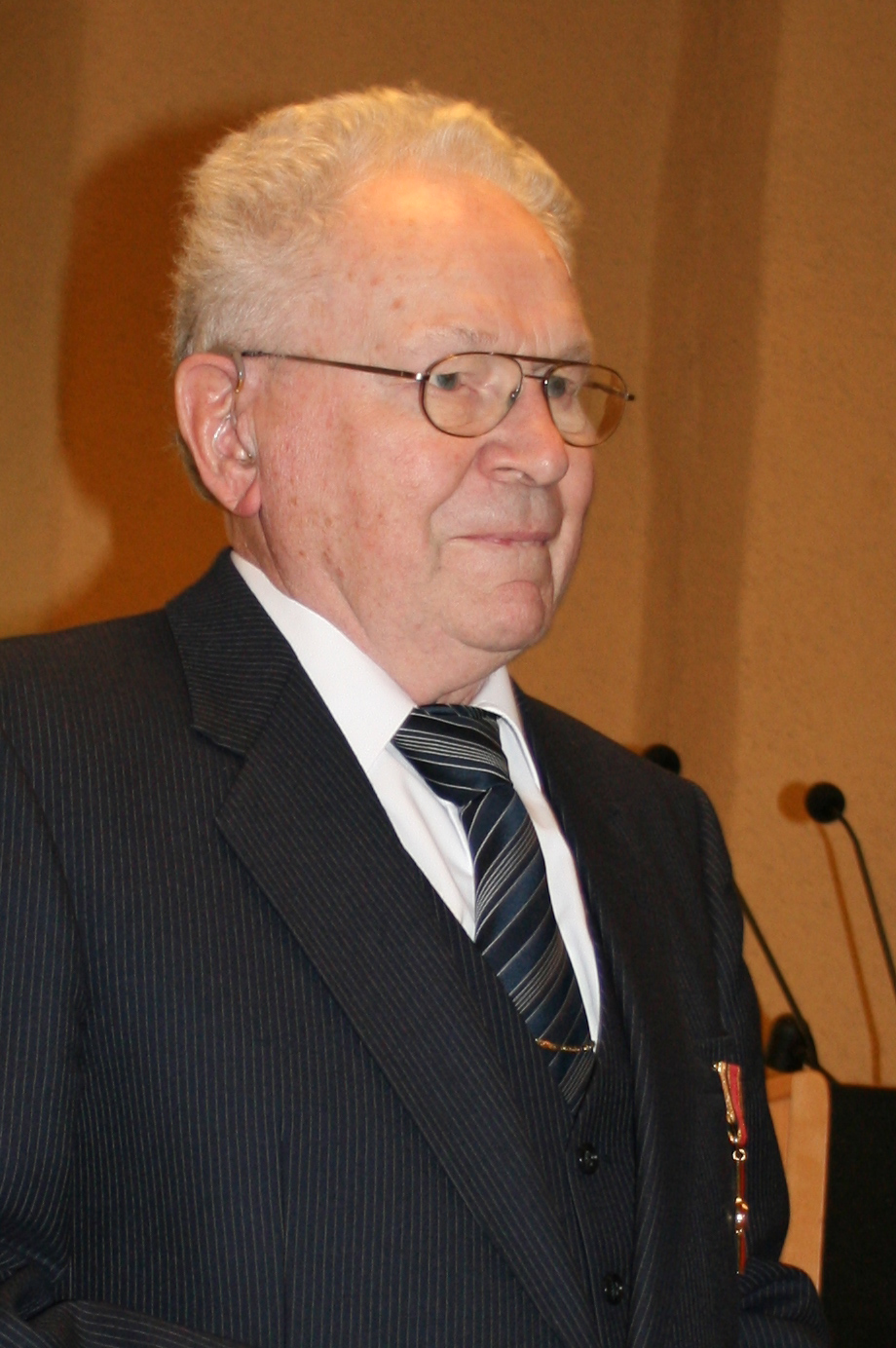 Konrad Pätzold bei der öffentlichen Verleihung des Bundesverdienstkreuzes am 3. Dezember 2009 durch die hessische Ministerin Kühne-Hörmann im Rathaus von Witzenhausen